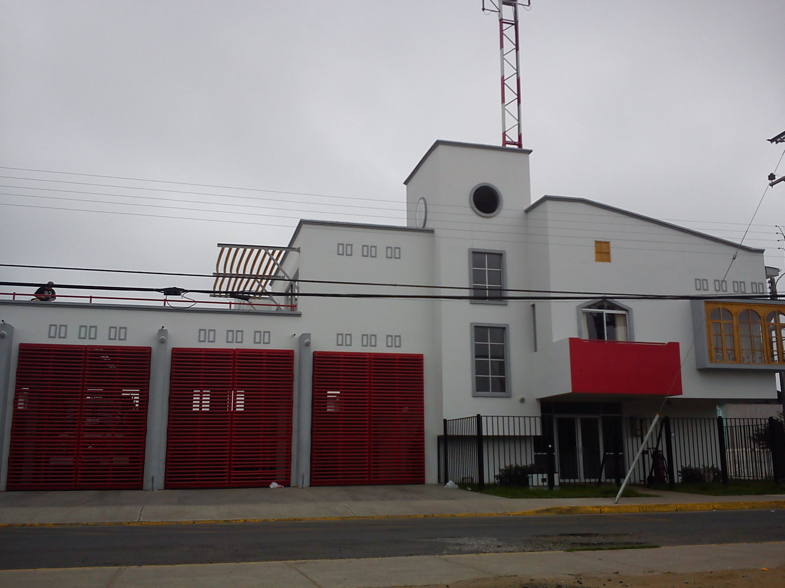 8a Companía de Bomberos de Coquimbo